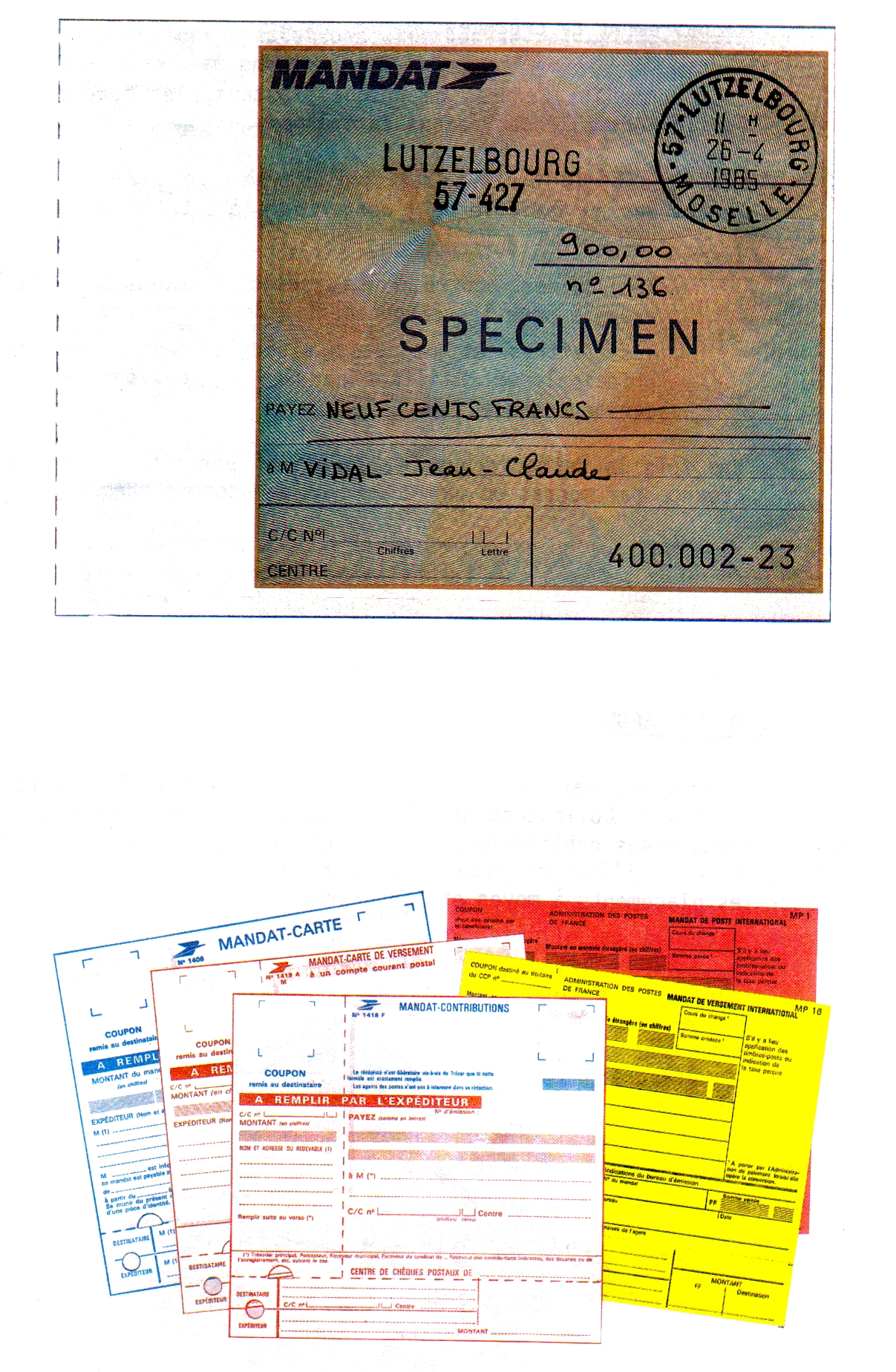 Divers anciens imprimés de mandats qui n'ont plus cours.